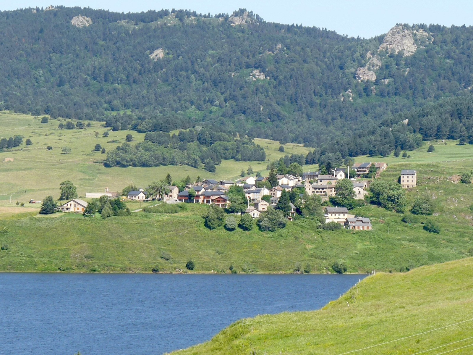 Puyvalador et son lac, Pyrénées-Orientales, France